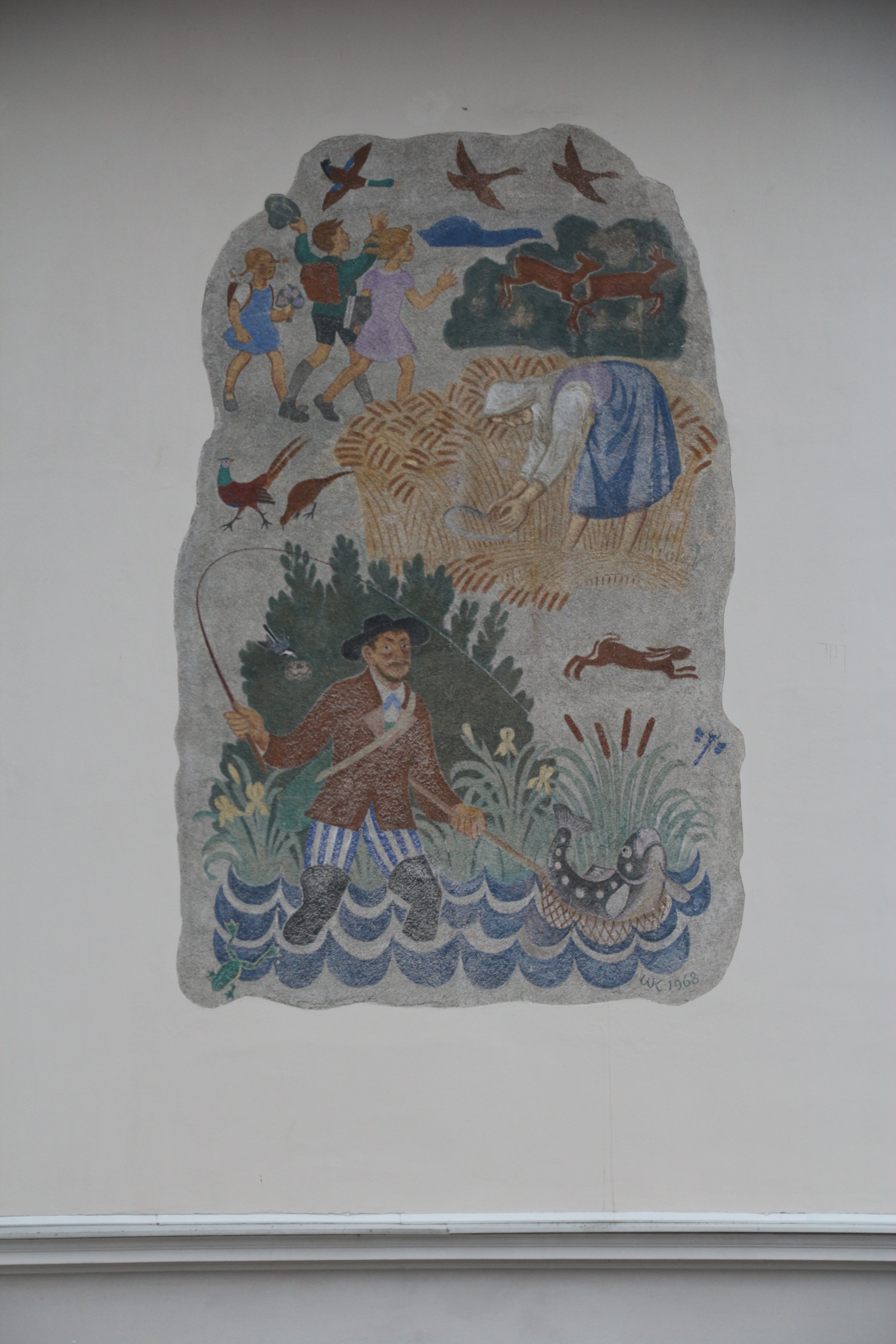 Wandgemälde von Wilhelm Kaufmann von 1967 an der alten Volksschule Liefering (heute Volksschule Liefering I), Salzburg